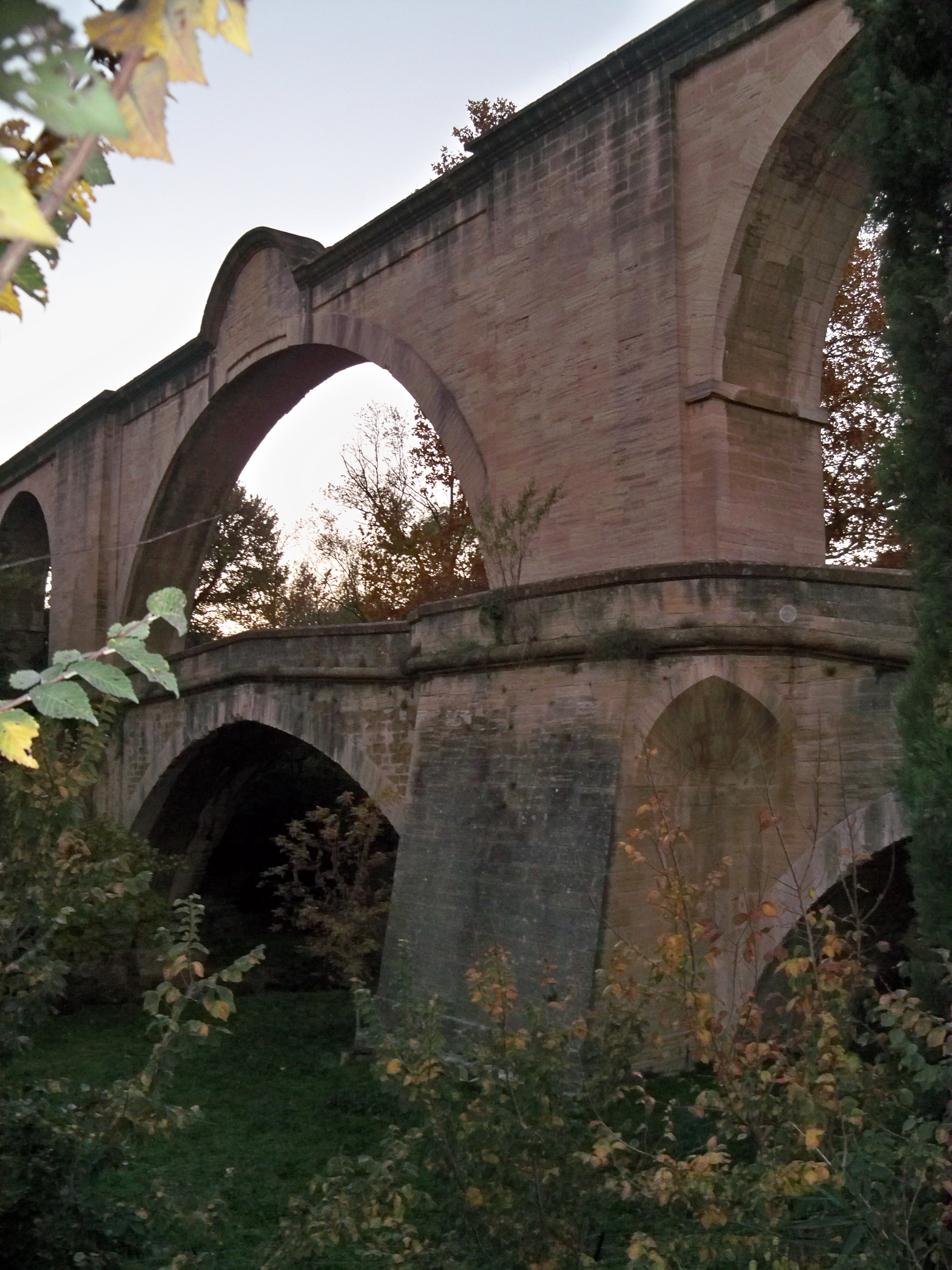 Acqueduc de Carpentras, arche au dessus de la rivière l'Auzon (Vaucluse, France)